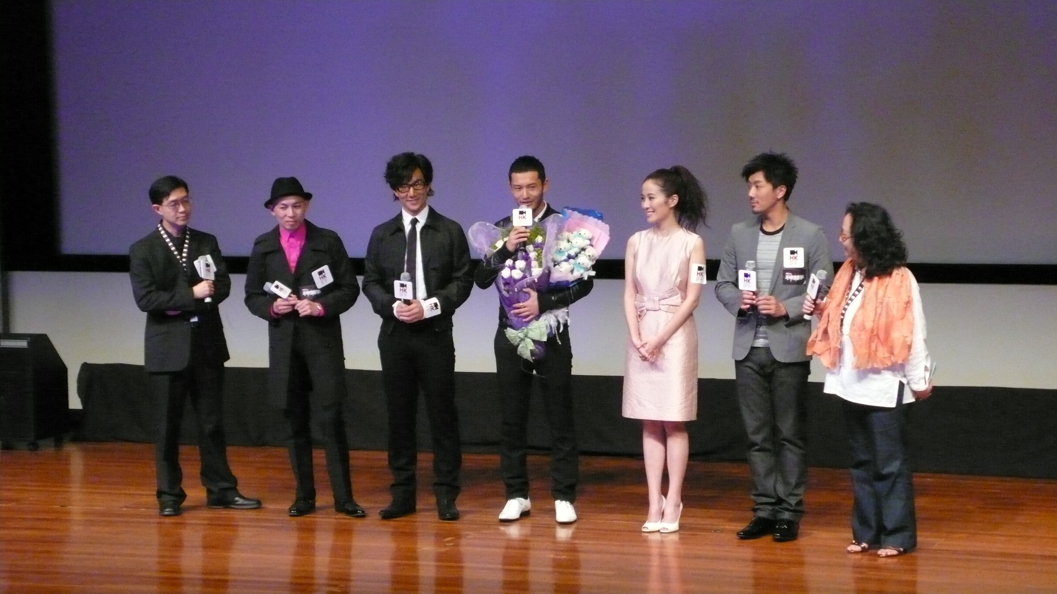 中文（中国大陆）: 《神枪手》首映礼